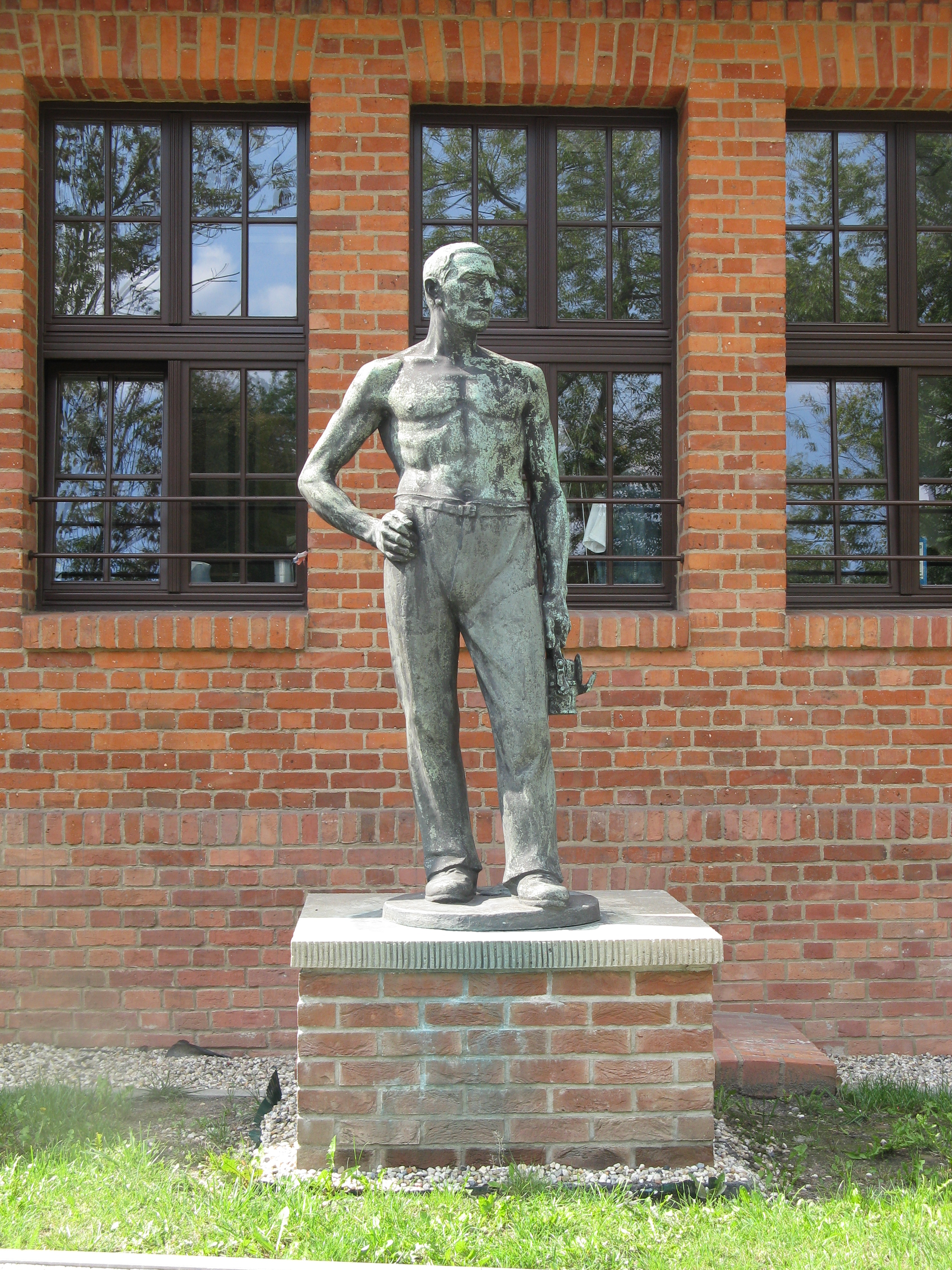 Rzeźba Waltera Tuckermanna z około 1935 roku stojąca przed cechownią kopalni Rozbark w Bytomiu, przeniesiona z terenu KWK Centrum.